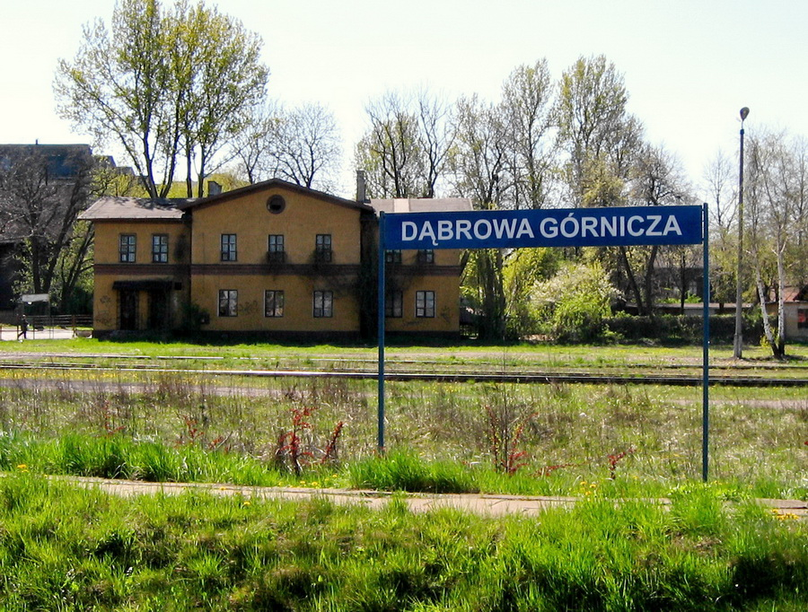 Dworzec w Dąbrowie Górniczej